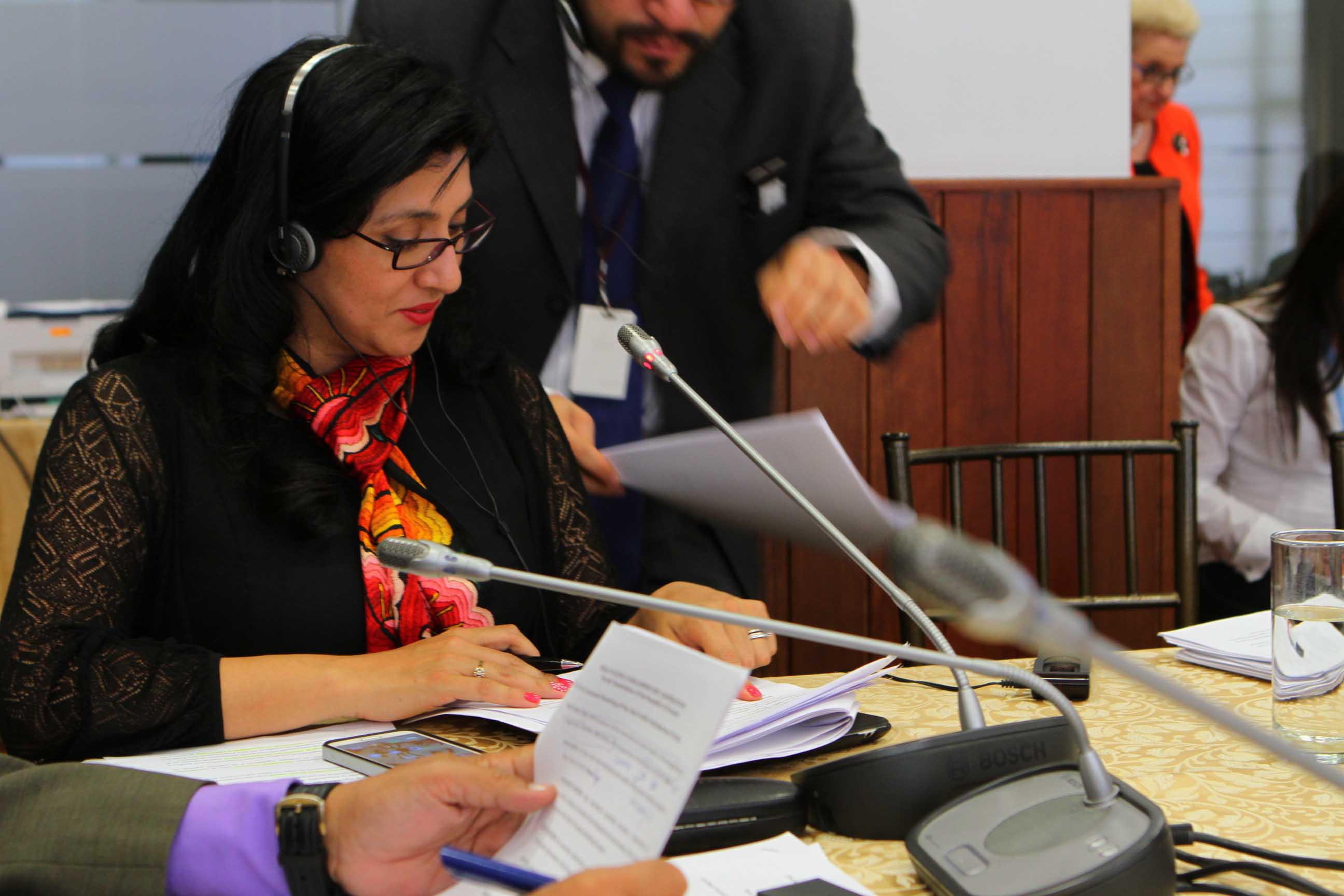 Quito, 13 enero de 2015.- Asambleísta Fernando Bustamante, presidente del Comité de Redacción - Tercera sesión plenaria y situación internacional: Economía y Cooperación Regional Fotografía: Hugo Ortiz / Asamblea Nacional